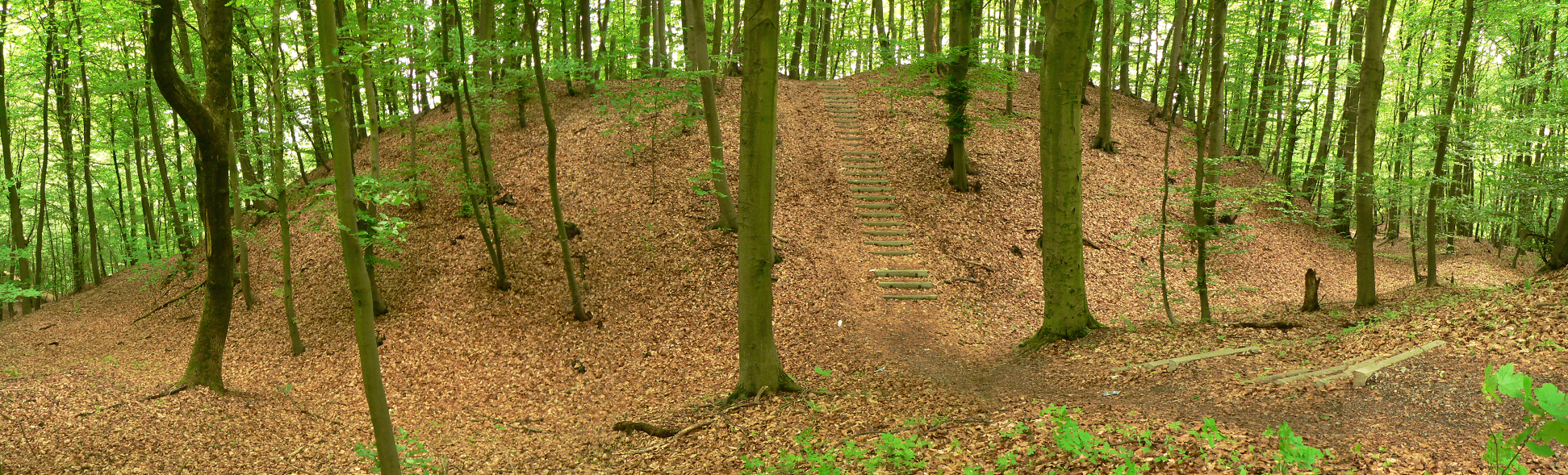 Vorburg der Hünenburg (Rinteln) Hohenrode